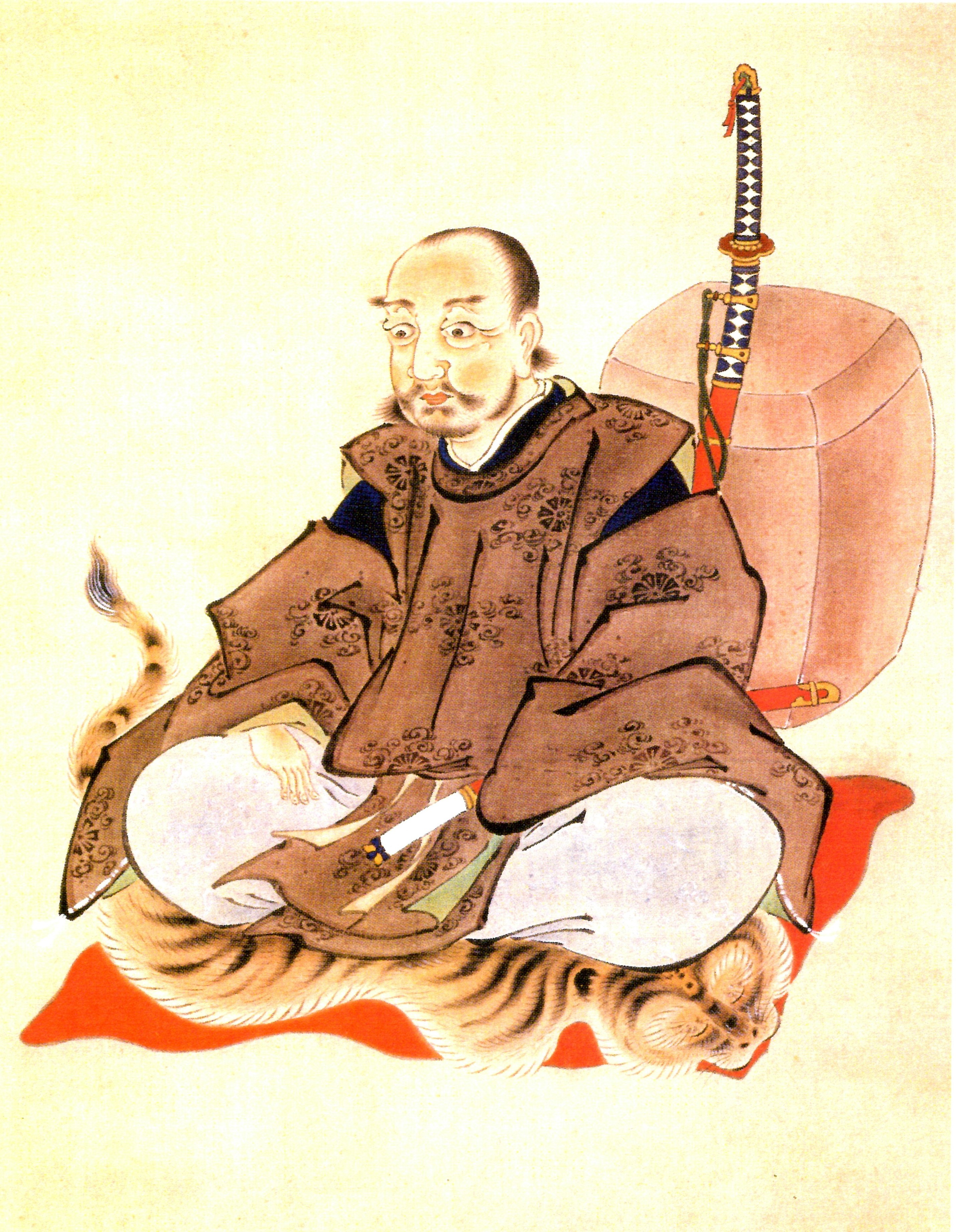 松平忠直の自画像。